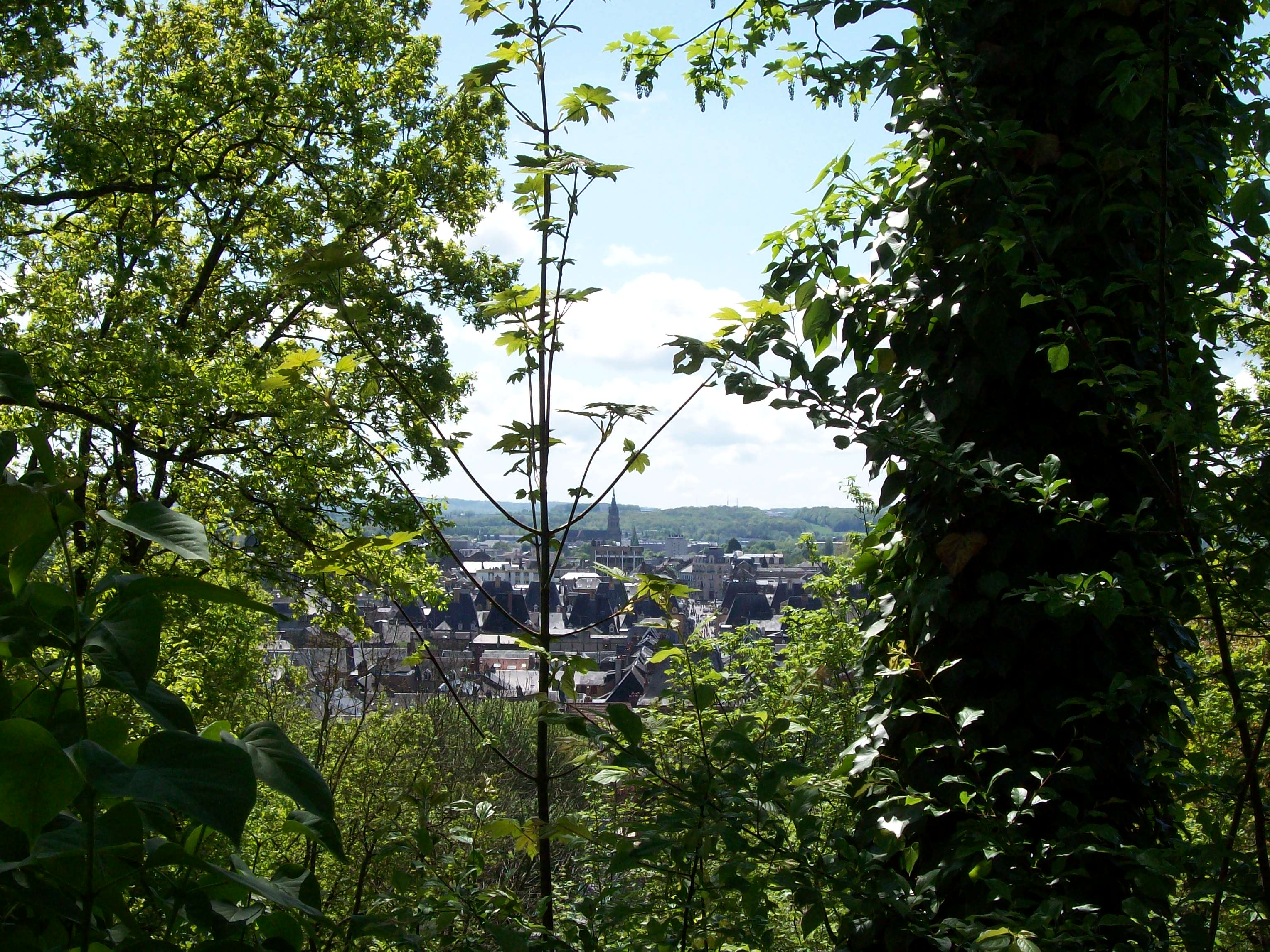 Ville: Charleville-Mézières Région: Champagne-Ardenne Pays: France